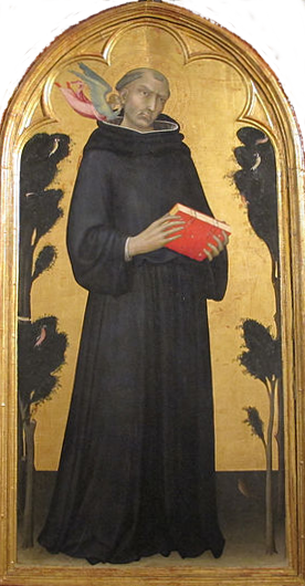 Sección central del Retablo del Beato Agustín Novello. El monje se encuentra en la sección central dentro de un arco trilobulado, flanqueado por dos arbolillos con pájaros posados en sus ramas, sosteniendo el libro rojo donde está escrita la orden de la regla de San Agustín.